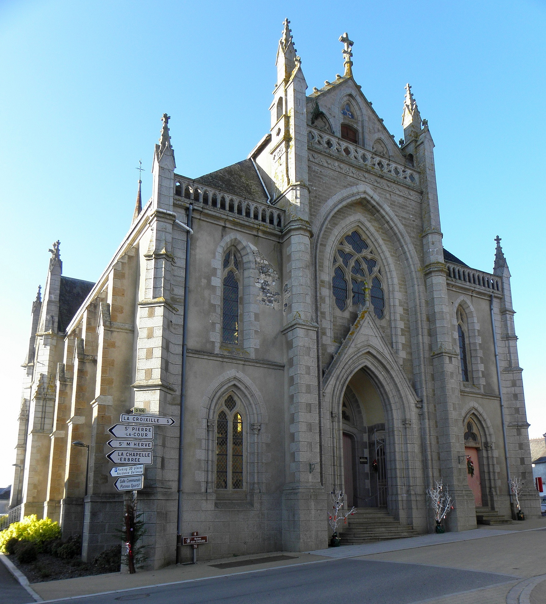 Façade orientale de l'église Saint-Pierre de Bourgon (53).